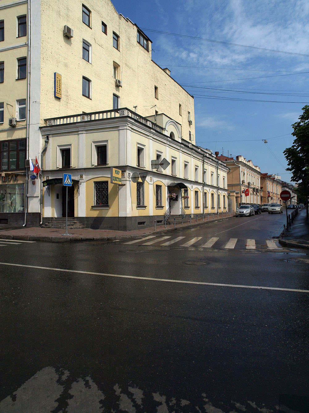 Bolshaya Nikitskaya Street, Moscow.